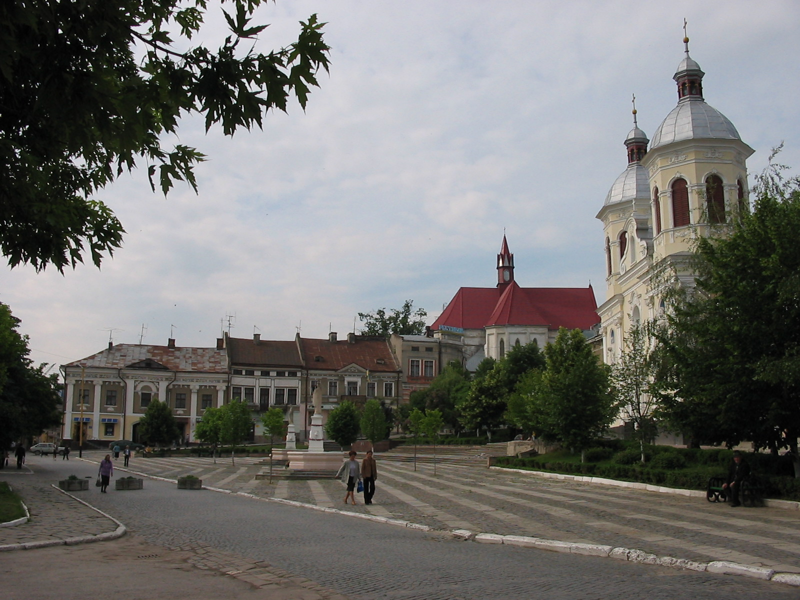 Main Rynok (Ringplatz) square in Berezhany, western Ukraine.